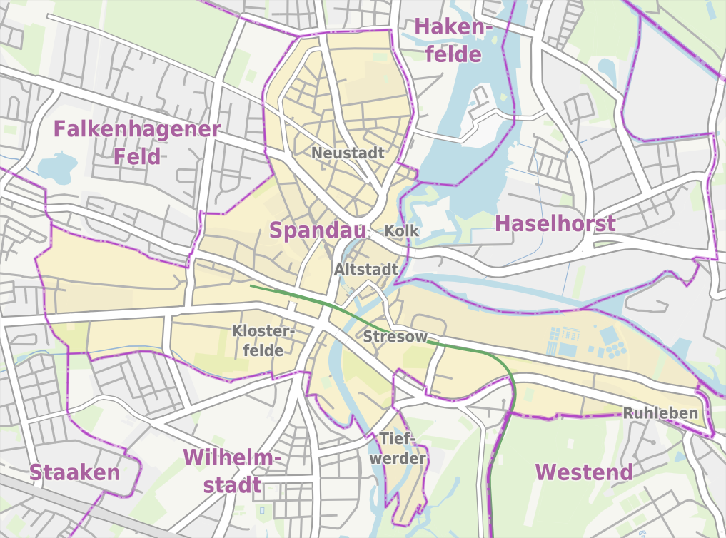 Übersichtskarte der Straßen und Ortslagen in Berlin-Spandau